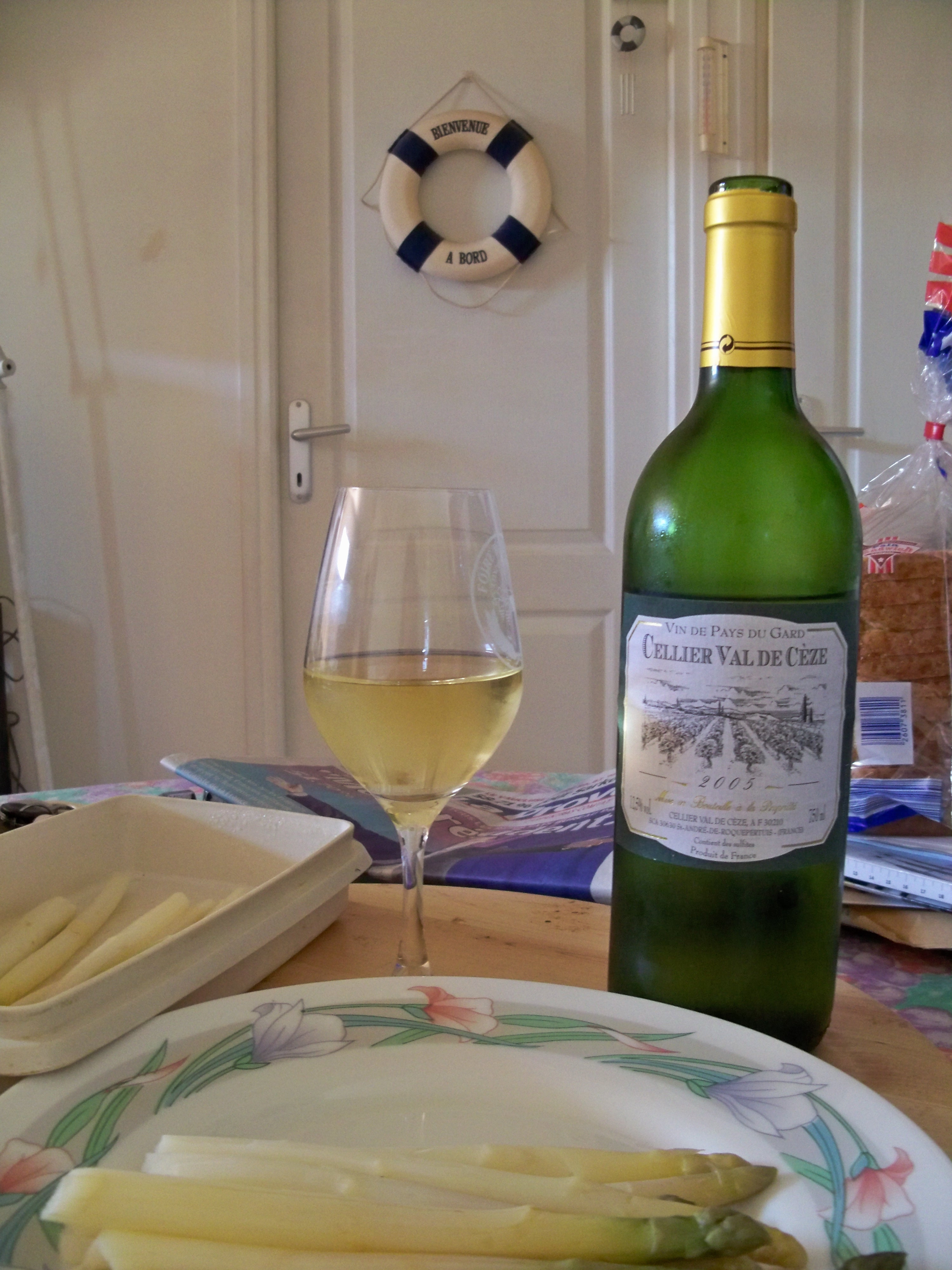 bouteille de vin du pays du Gard blanc